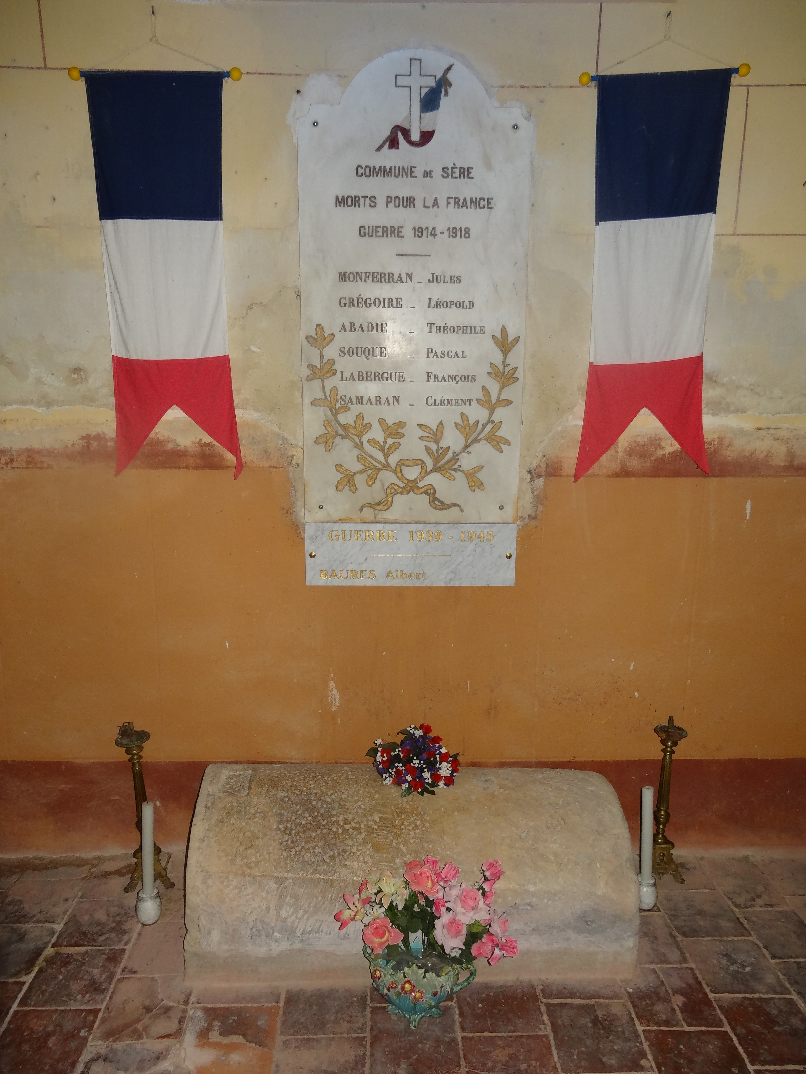 Monument aux morts situé dans l'église Saint-Martin de Sère